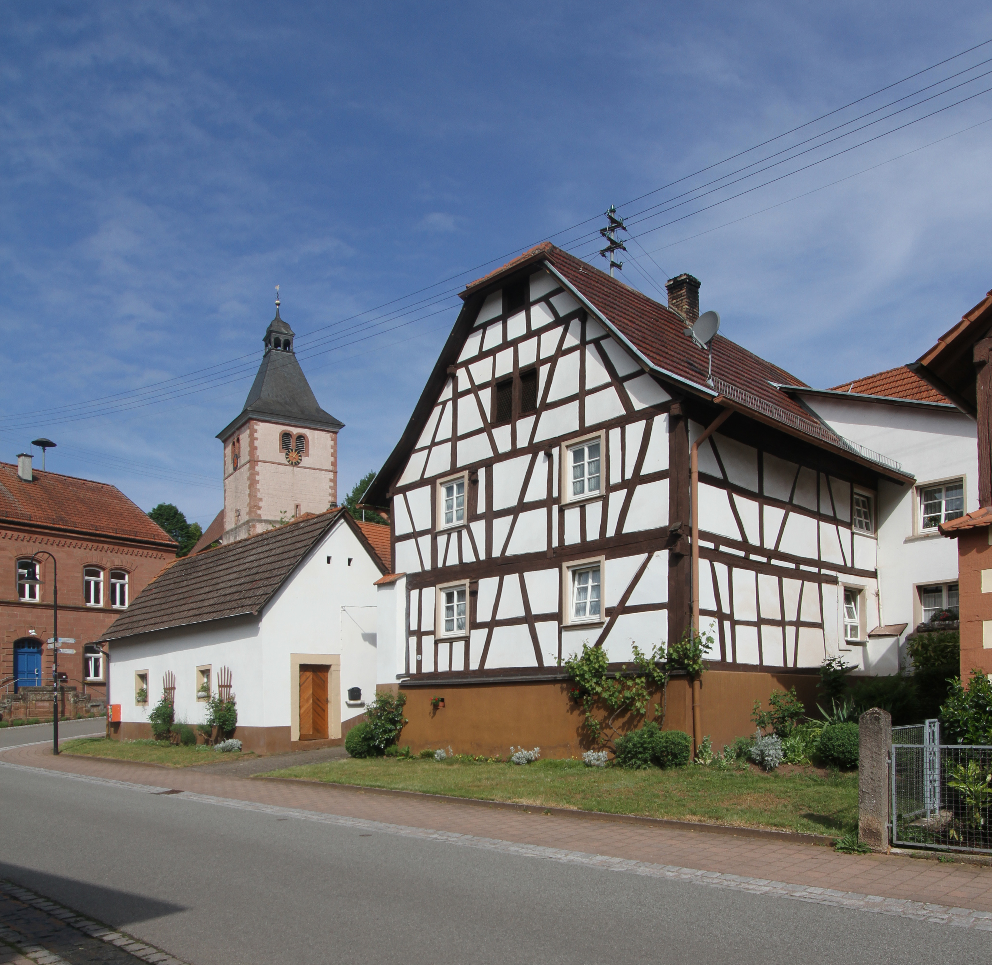 Denkmalgeschütztes Haus in Rumbach.